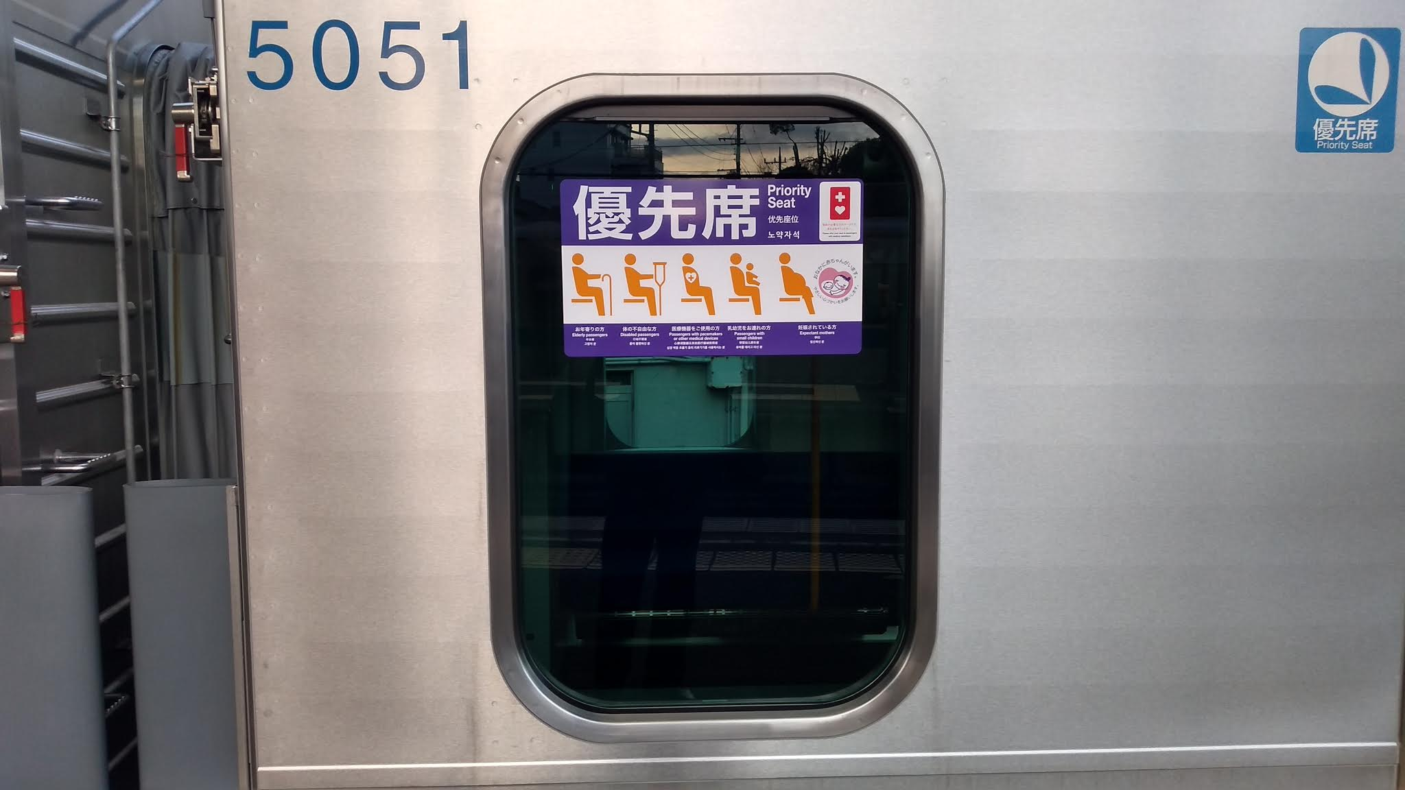 優先席付近の窓